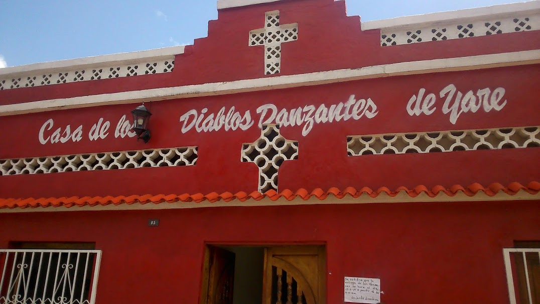 Lugar donde los diablos danzantes se reúnen en la víspera de Corpus Christi para salir a recorrer las calles de la población.